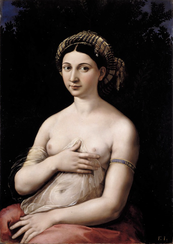 Зображено Маргариту Люті — імовірно кохану Рафаеля